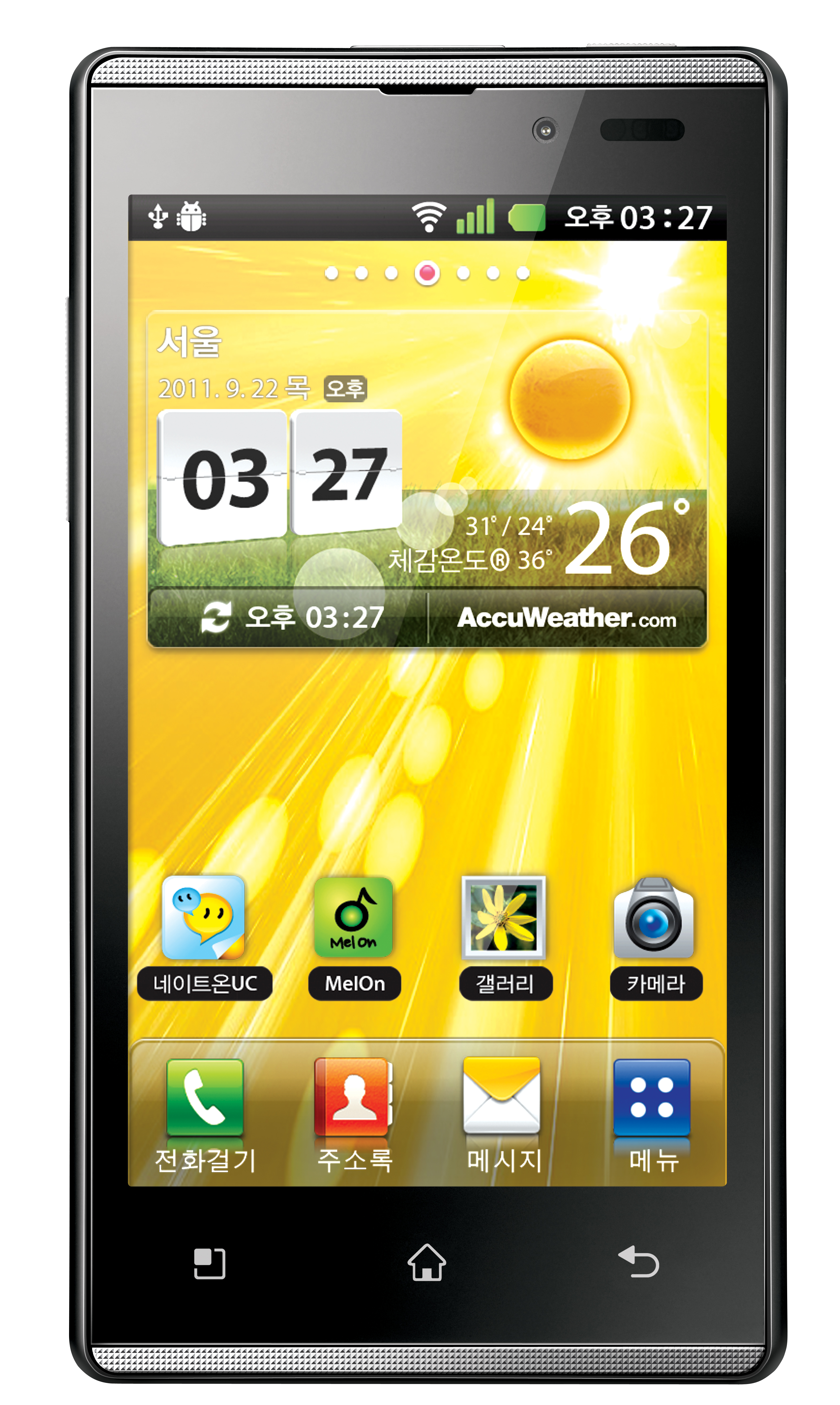 LG전자, '옵티머스 EX' 출시 ※ LG전자 뉴스룸 에서 관련 보도자료를 확인실 수 있습니다.